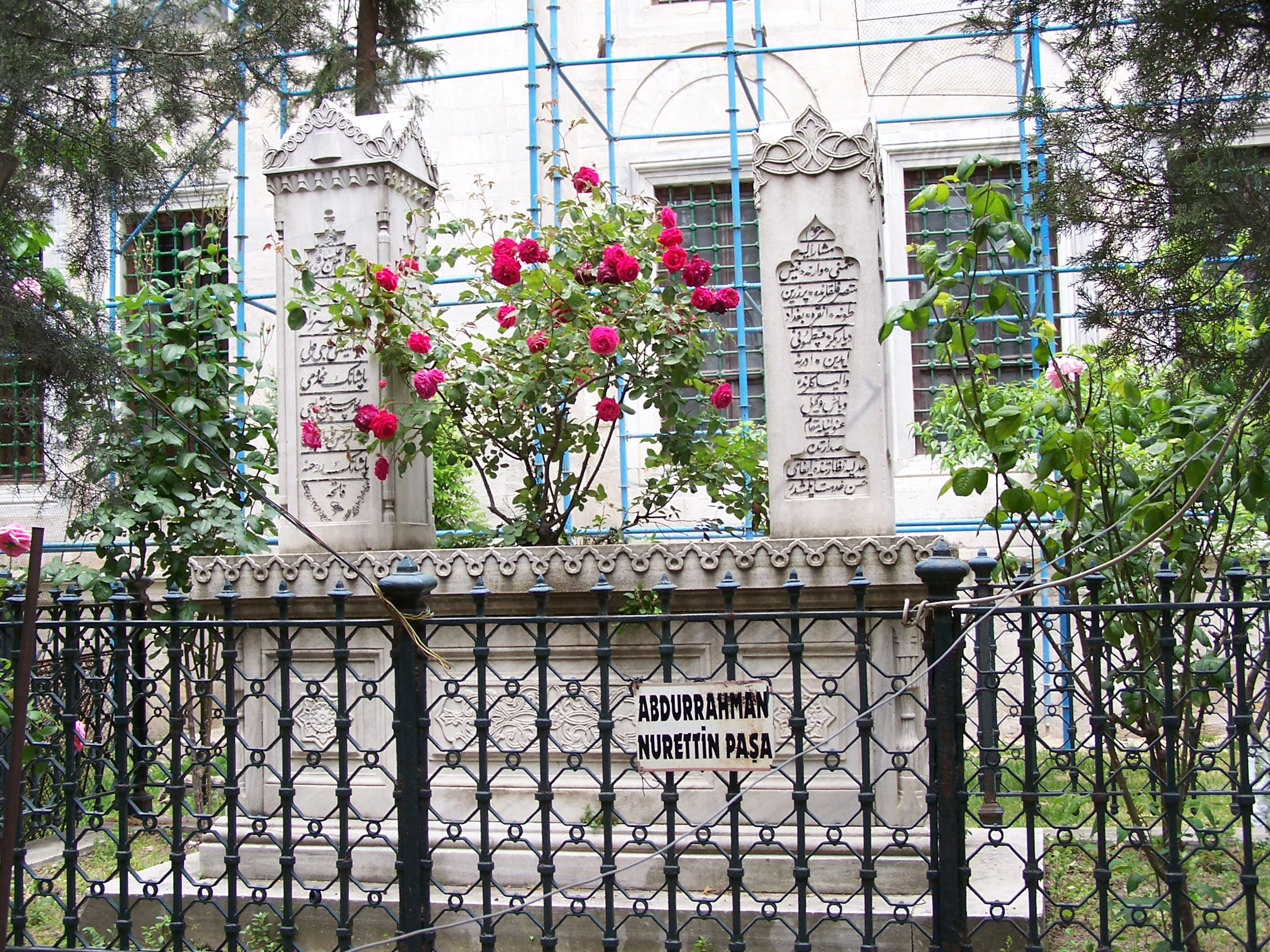 Grave of Abdurrahman Nurettin Paşa at Fatih Camii in Fatih, İstanbul, Turkey